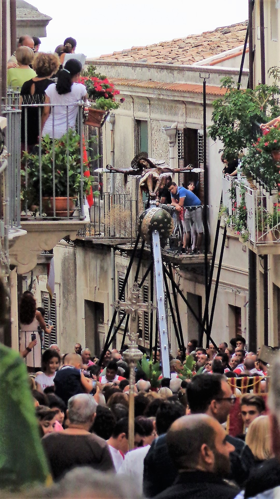 Fase della processione d'agosto